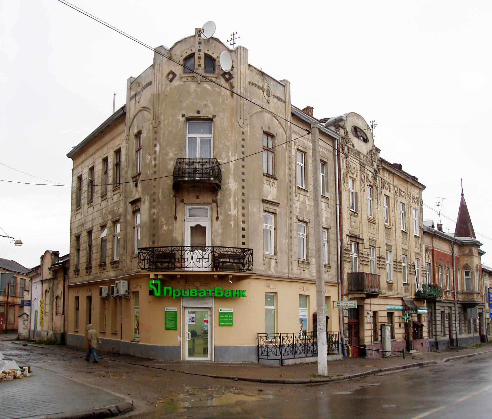 Будинок № 2 на вулиці Зустрічній у Львові (1908 р., арх. Міхал Улям)